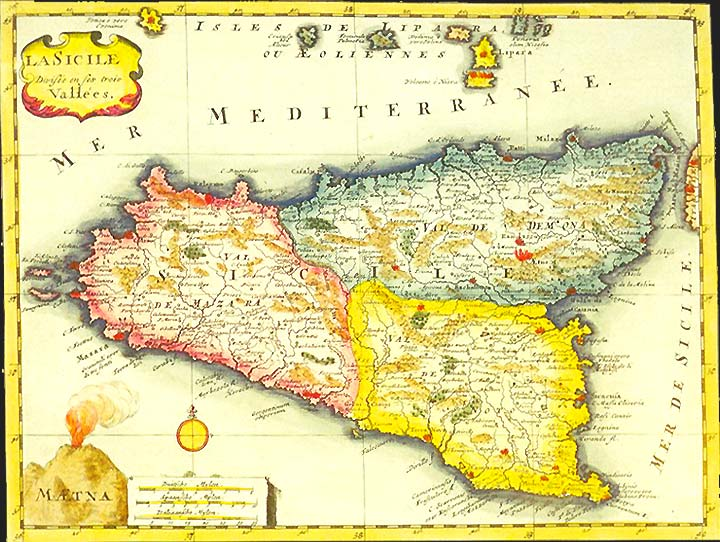 Sicili araba, divisa in tre "valli"